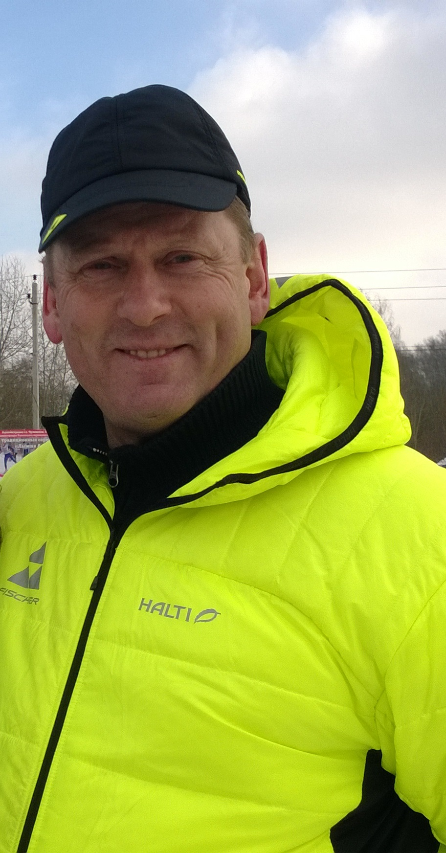 Александр Завьялов на "Лыжне Завьялова-2015"